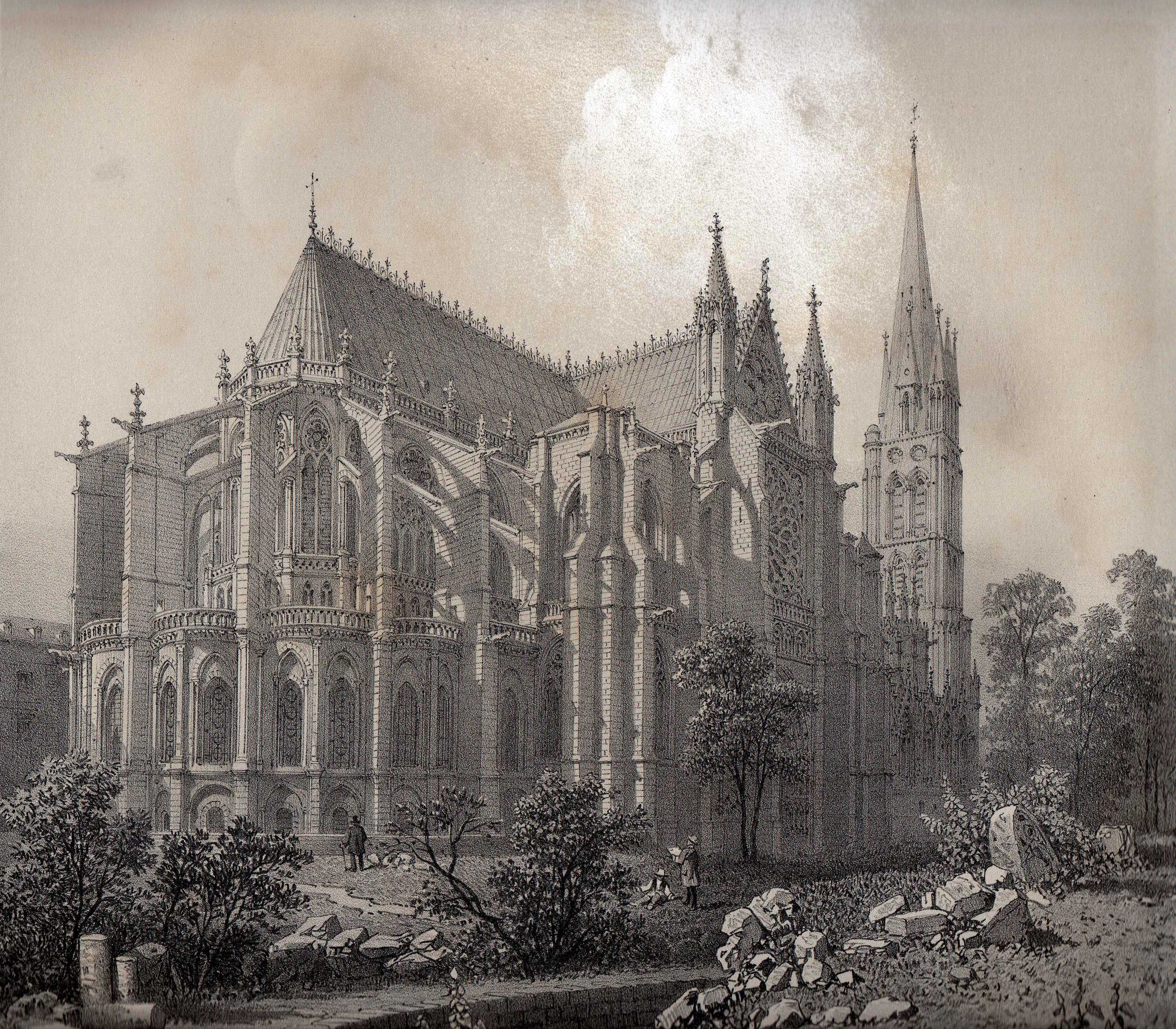 Détail d'une lithographie de Félix Benoist : Eglise de l'abbaye de Saint-Denis (Abside et façade septentrionale), Ed.Charpentier (Nantes, Paris). Coll. "Paris dans sa splendeur", n° 94.